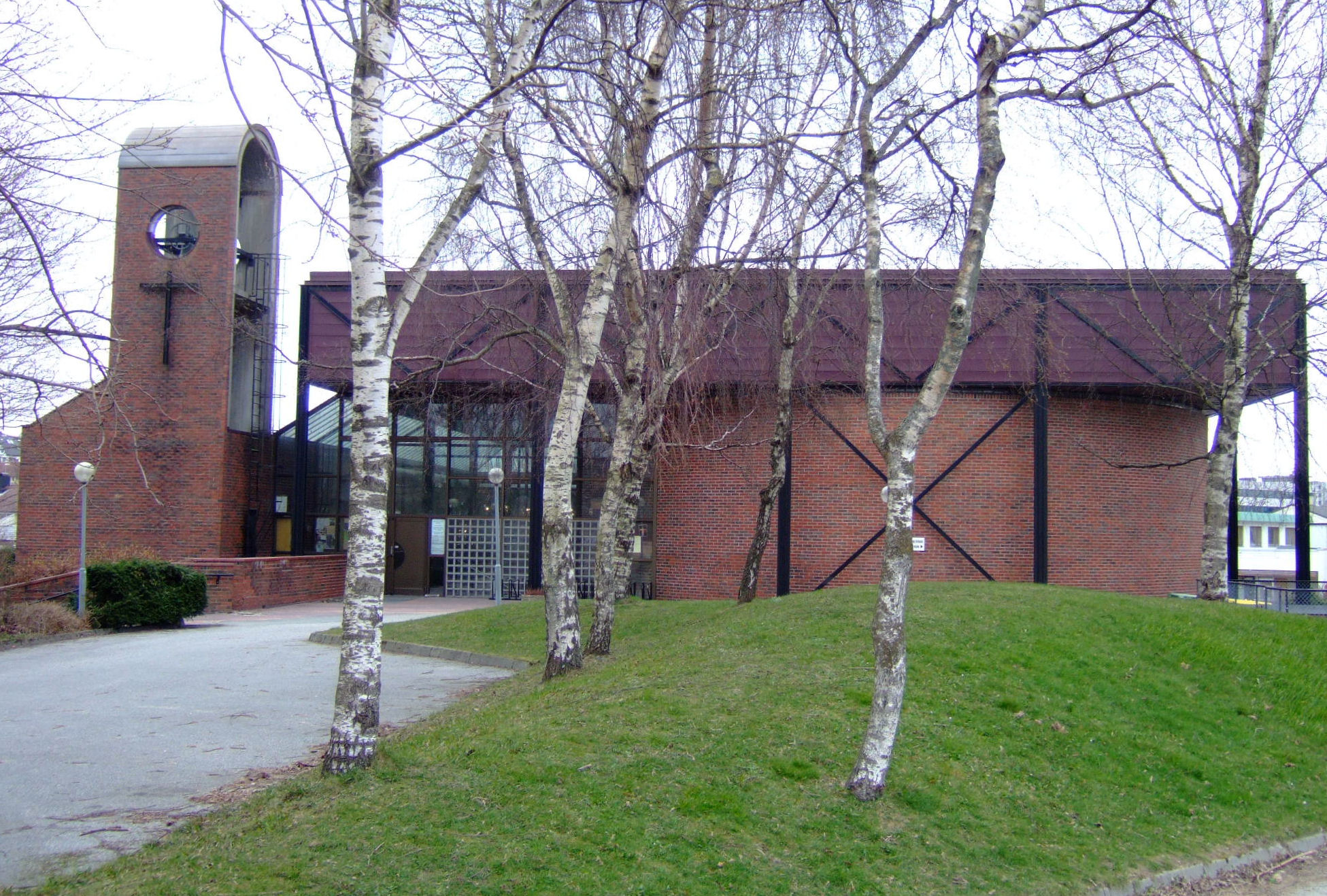 Bekkefaret kirke, Stavanger Norway